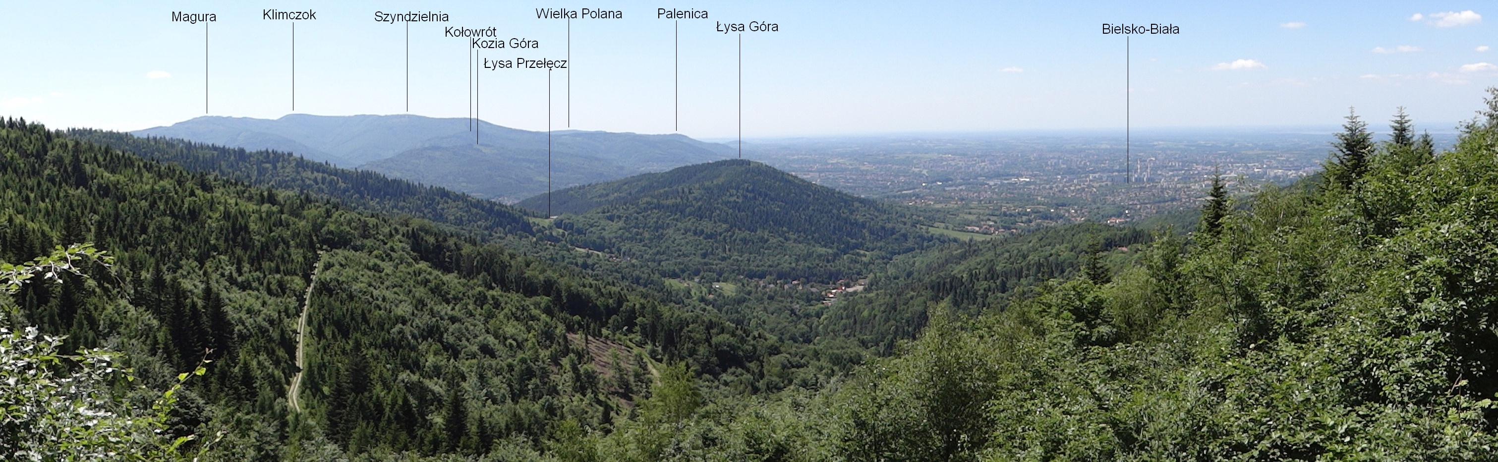 Widok ze zboczy Sokołówki